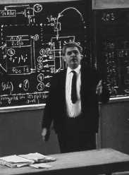 Nikolaus_Joachim_Lehmann Historische Aufnahme aus dem Jahr 1967 zeigt die erste Stunde, die Einführung in die Vorlesungsreihe „Maschinelle Rechentechnik“ im Großen Mathematik Hörsaal der TU Dresden am Zellschen Weg. Von-Neumann-Architektur Die Kreidezeichnung zeigt Speicher, Register, Rechenwerk und die Befehlsausführung in Einzelschritten: 1-2-3-4-5